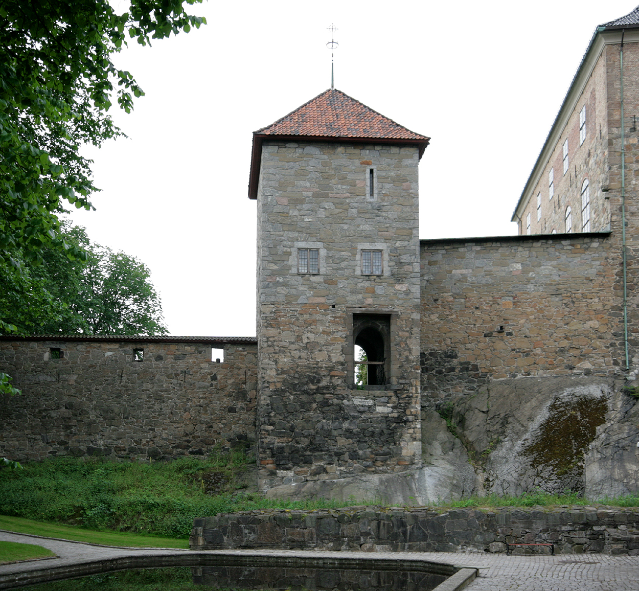 Jomfrutårnet, Akershus festning, Oslo. Bygd ca. 1300.